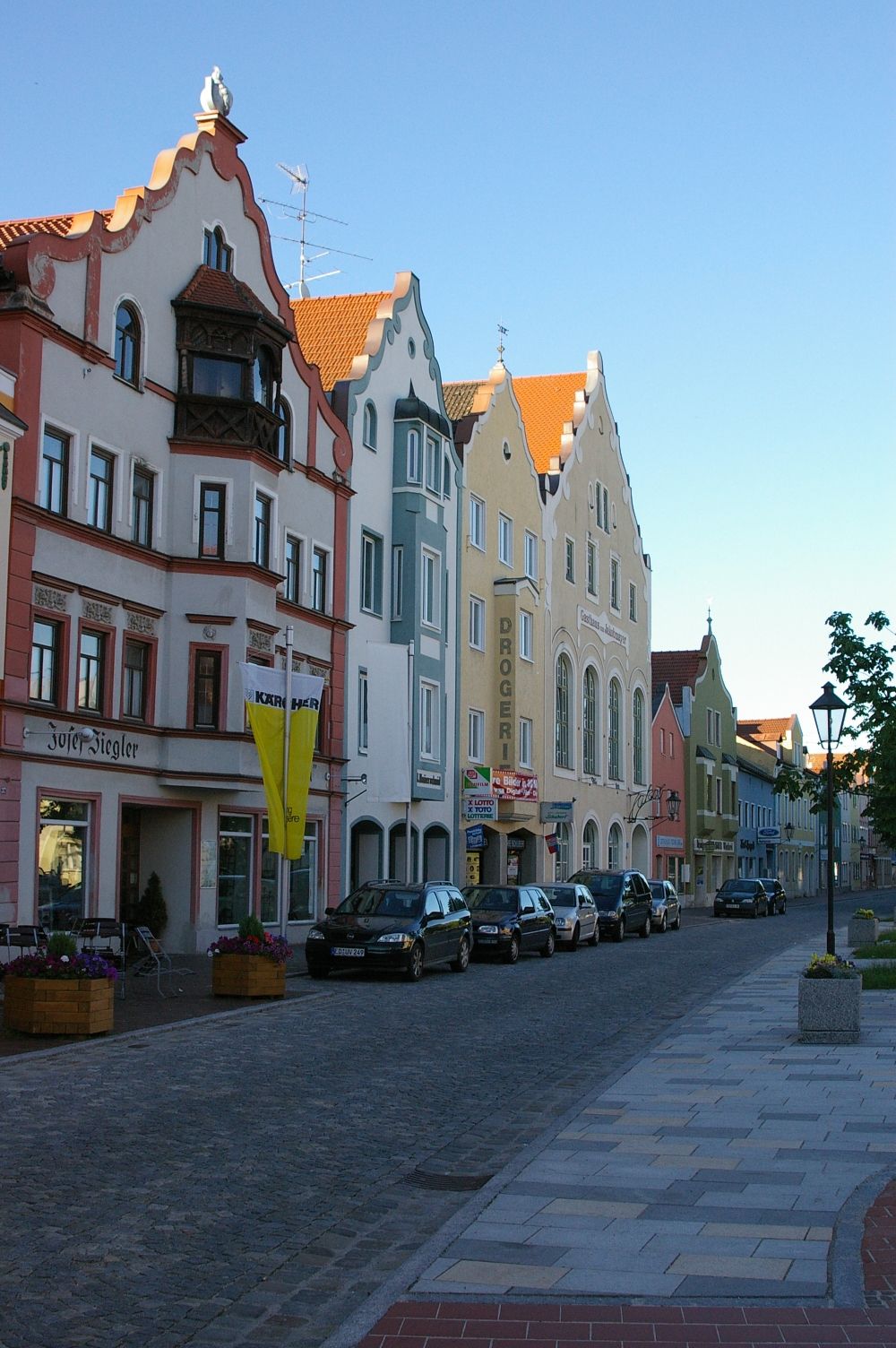 Dorfen, Markt, Bürgerhäuser Von mir selbst geschossen im Juni 2005.